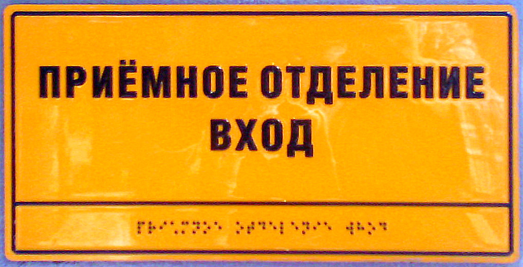 Приёмное отделение. Надпись на кириллице продублирована шрифтом Брайля